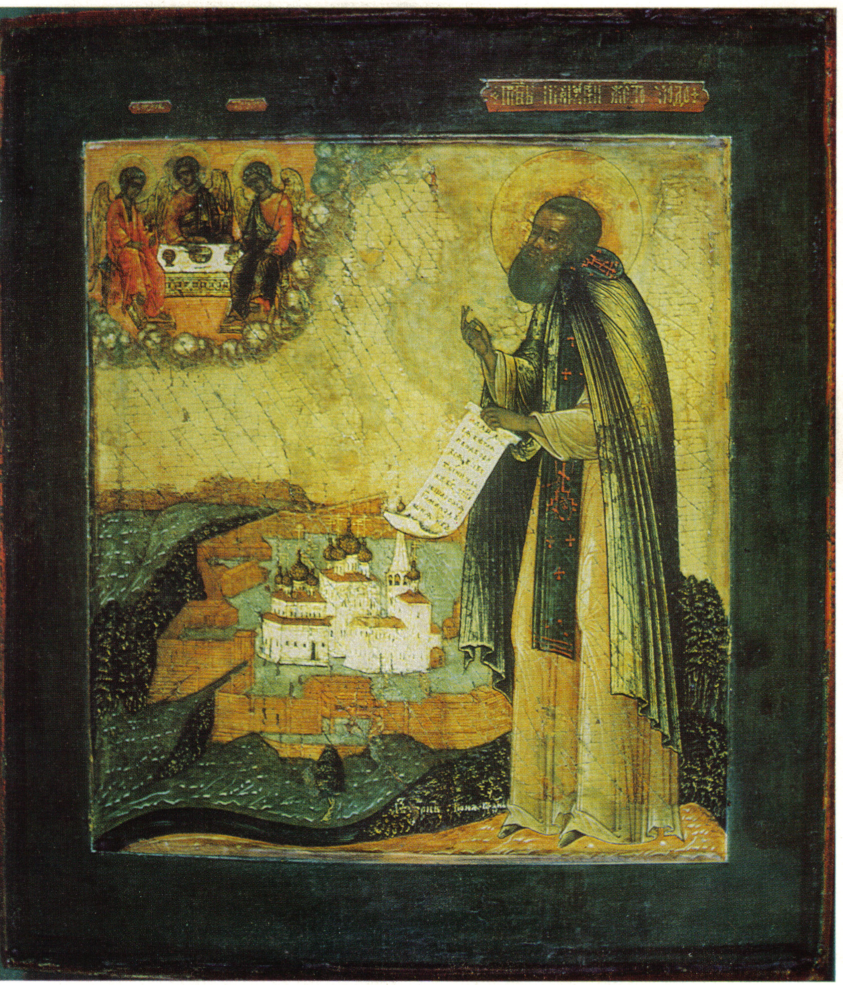 Икона преподобного Макария Желтоводского, Унженского